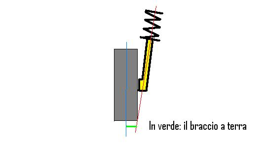 Creato dall'autore per la pagina "Braccio a terra"